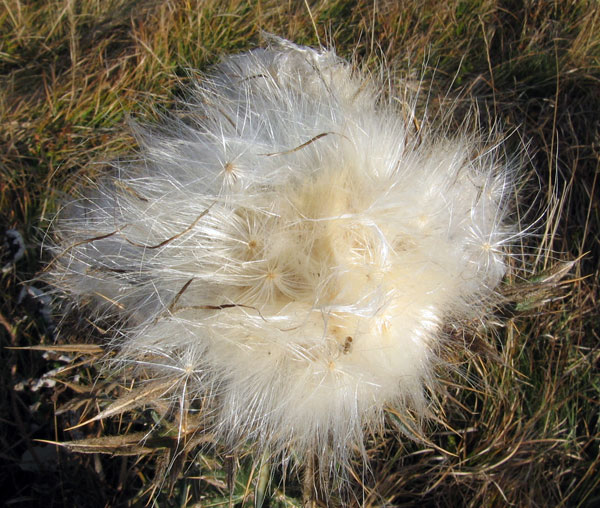 Flora Stare planine